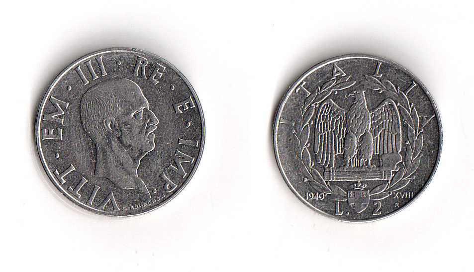 Regno d'Italia - Lire 2